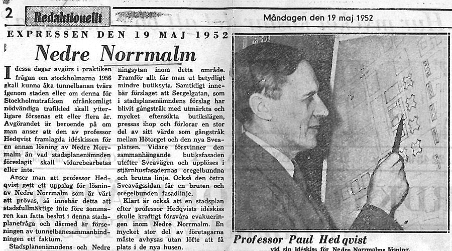 Arkitekt Paul Hedqvist i en tidningsartikel om Nedre Norrmalm